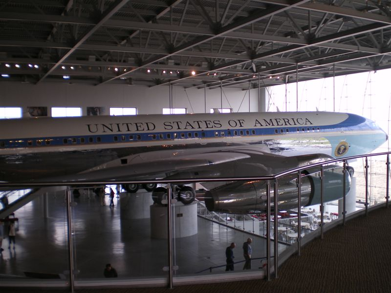 Air Force One, Boeing 707 in der Ronald Reagan Presidential Library in Simi Valley, Kalifornien